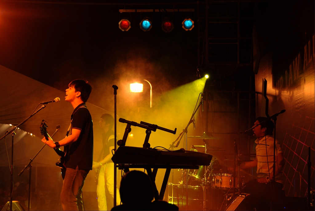 Rivermaya performing at U.P Diliman